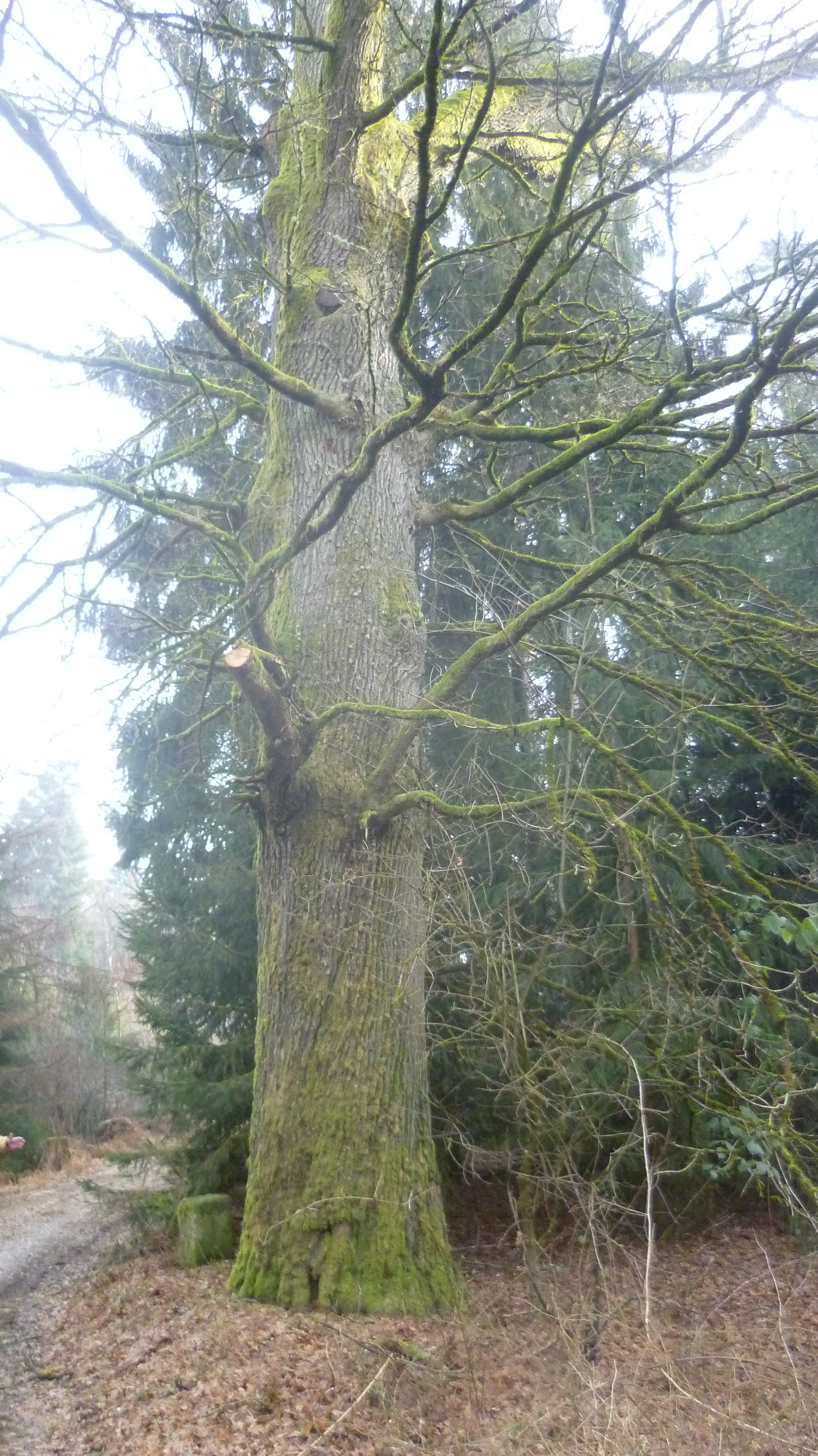 Die ca. 300 Jahre alte Eiche hat einen Umfang von ~ 3 m